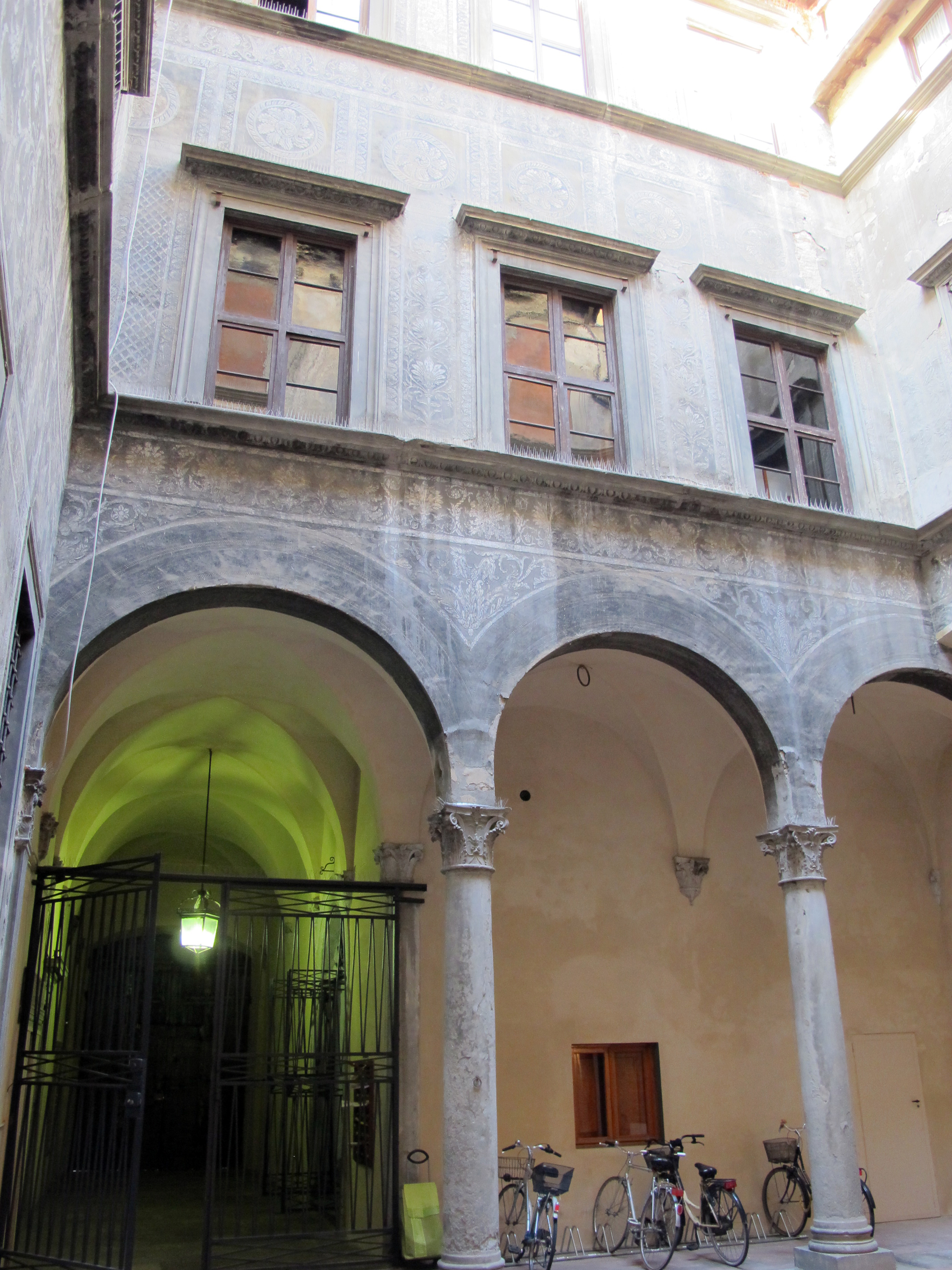 Palazzo Spinelli - Firenze